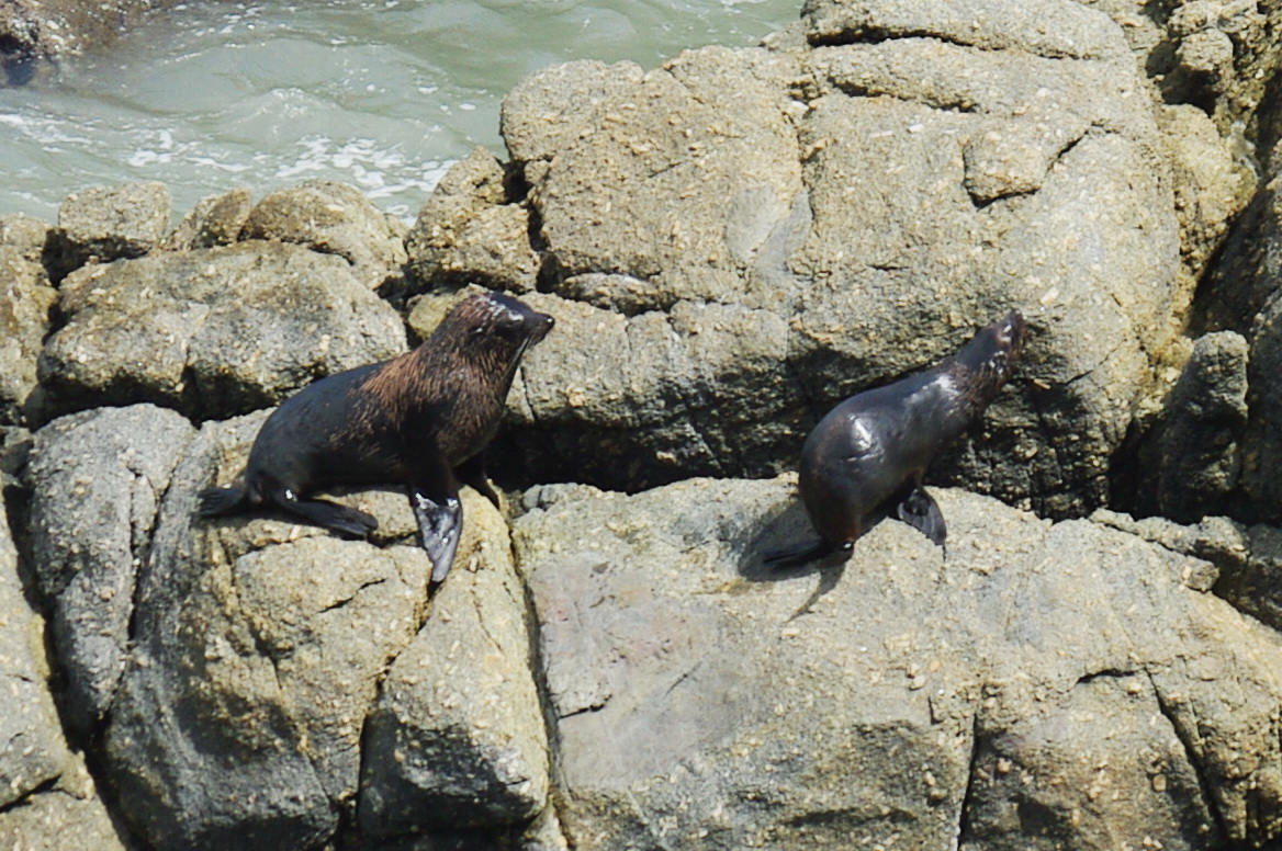 Robben am Cape Foulwind an der Westküste